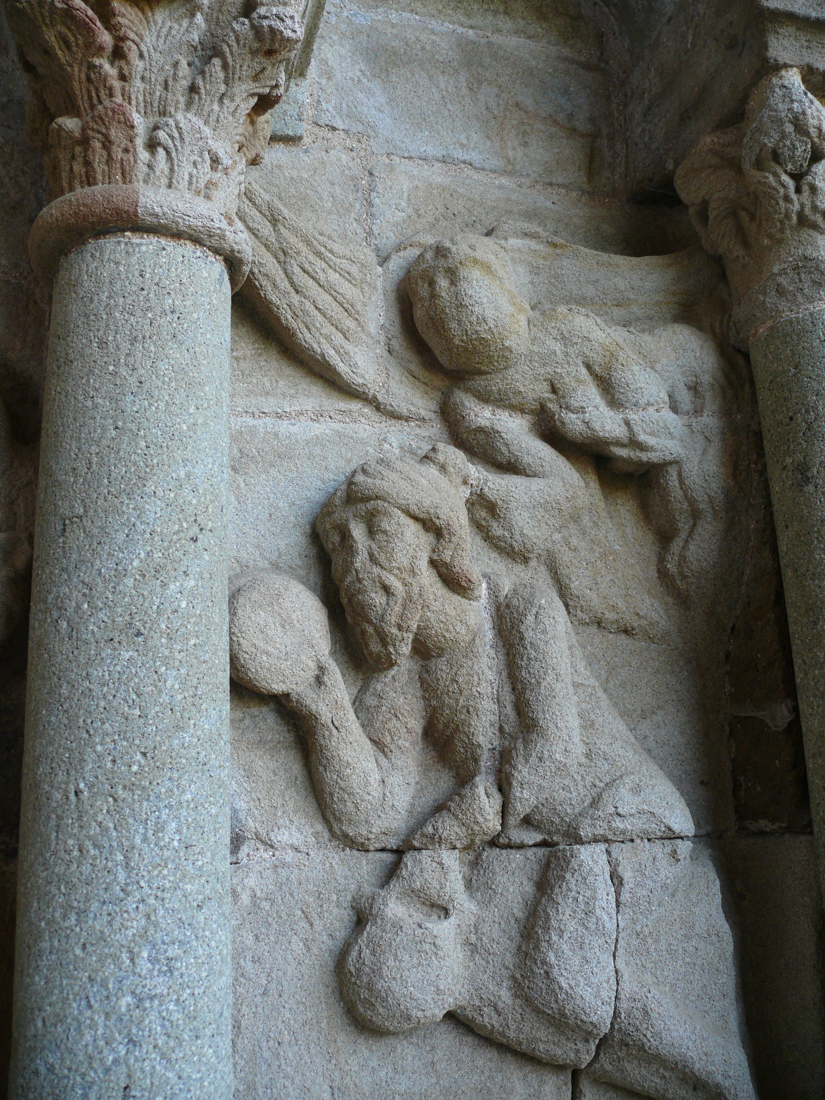 Ydes-Bourg - Eglise Saint-Georges - Porche ouest - Mur sud : Habacuc, porté par un ange, vient apporter de la nourriture à Daniel